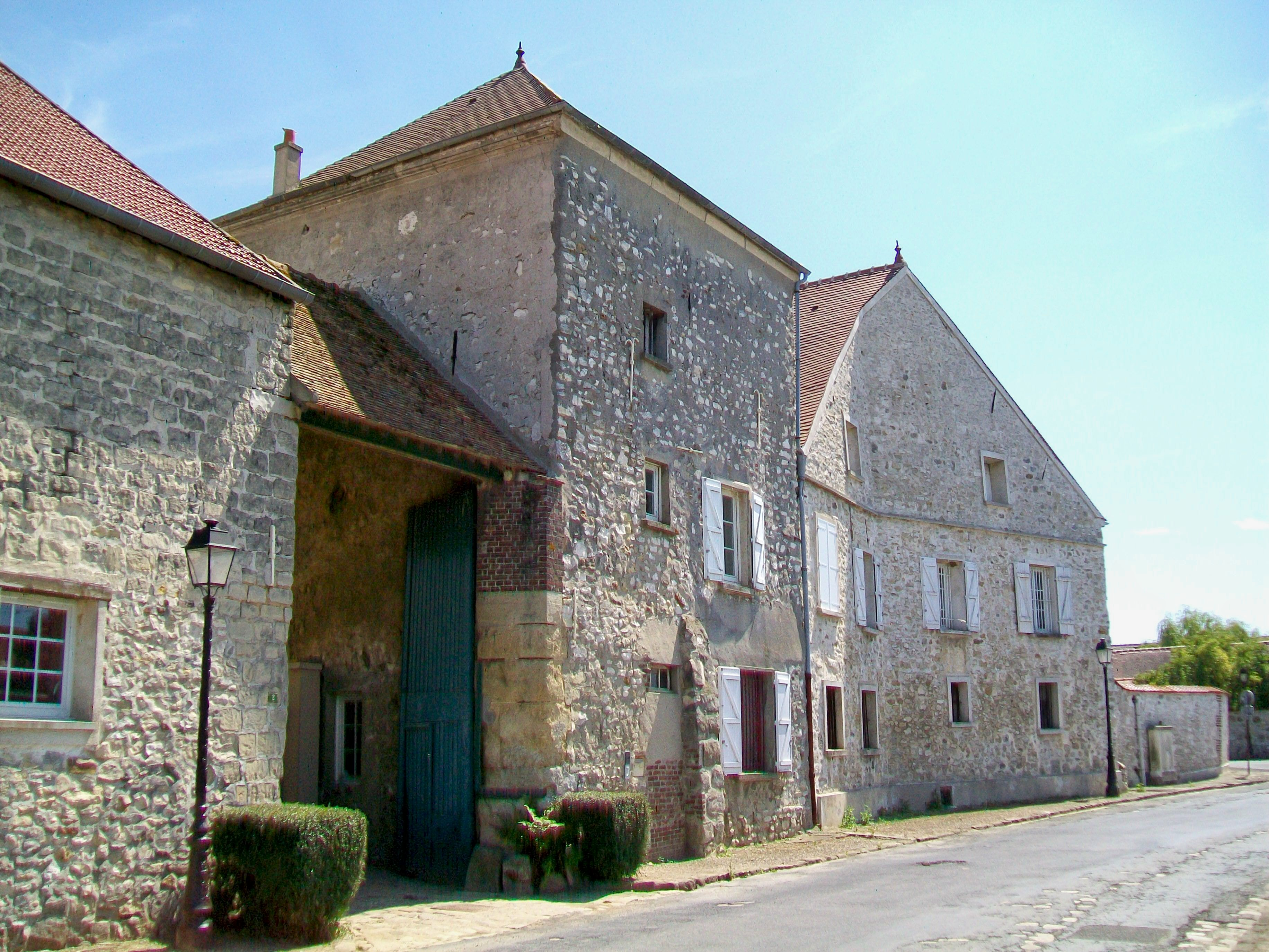 La ferme de la rue Georges-Pompidou avec son ancienne maison forte, vue depuis le nord-ouest.